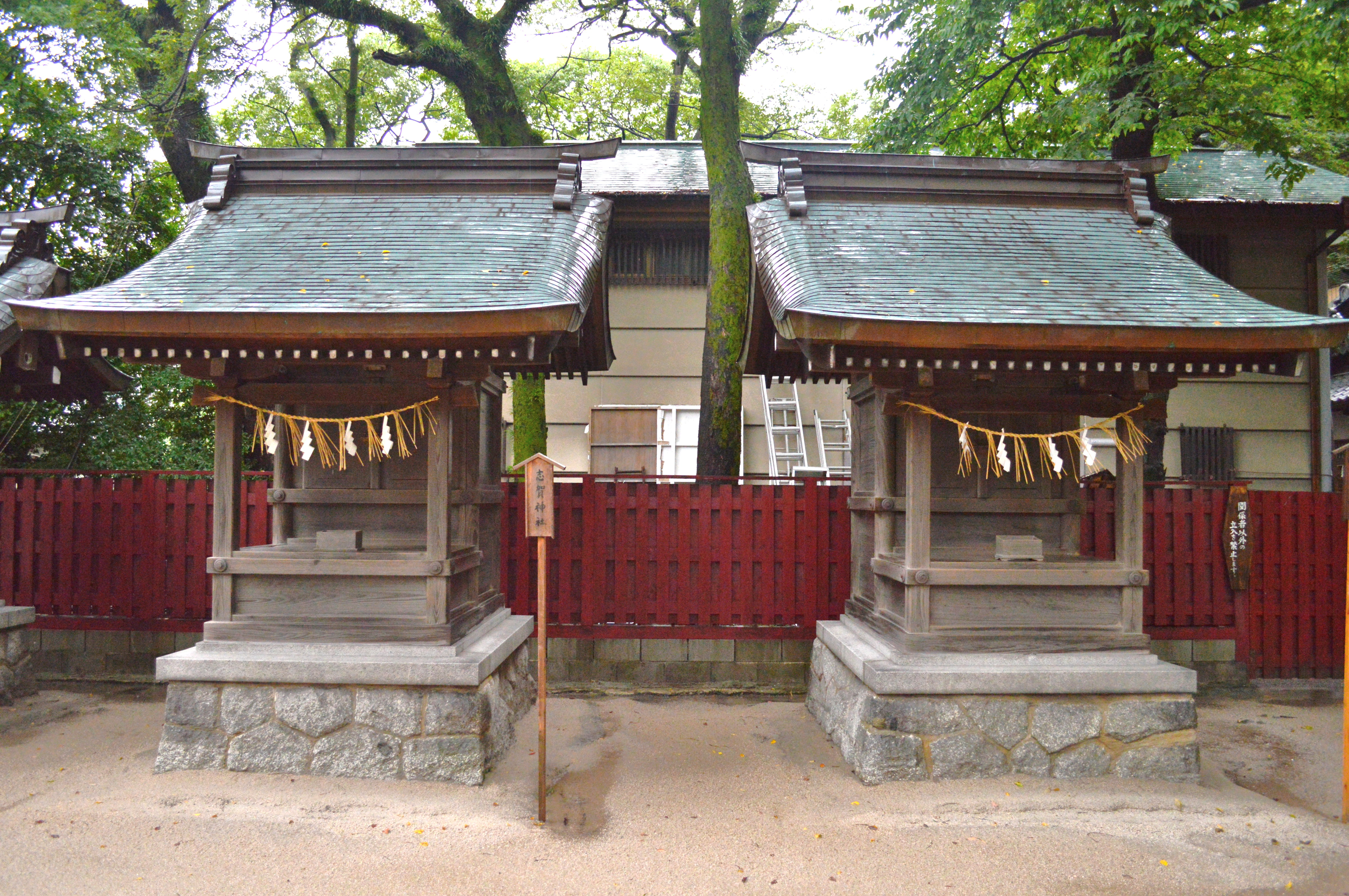 住吉神社 (福岡市) 摂社船玉神社・志賀神社